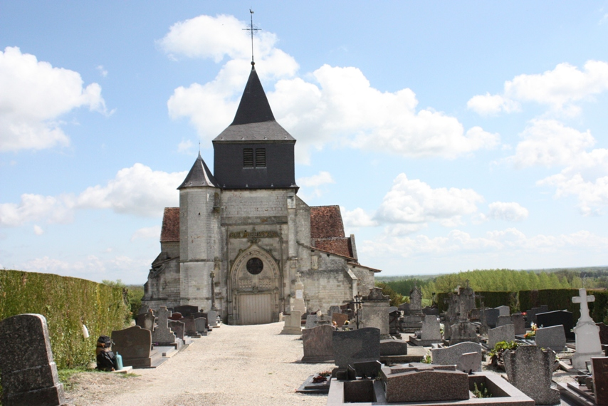 Église Saint-Antoine d'Arzillières-Neuville (Classé) .